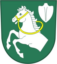 Litovany